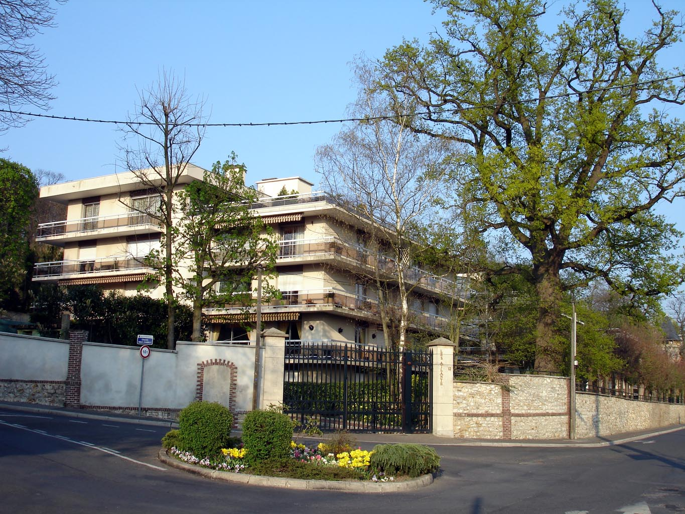 Résidence "Les Atlantes" à Montmorency (Val-d'Oise), France